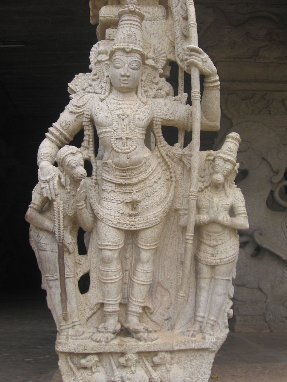 Lakshmana hugging Hanuman (left) and Angada